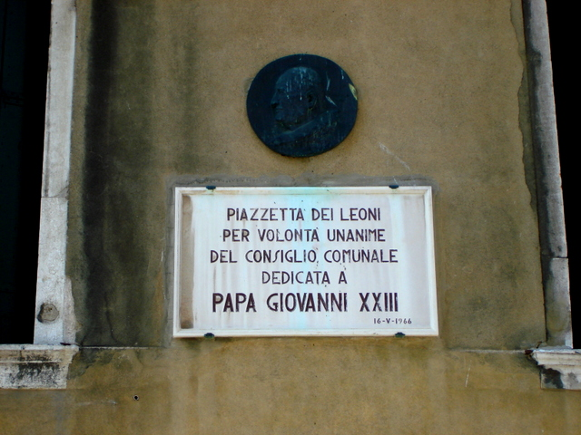 Wenecja, relief i tablica pamiątkowa poświęcona papiżowi Janow XXIII na Piazzetta dei Leoncini